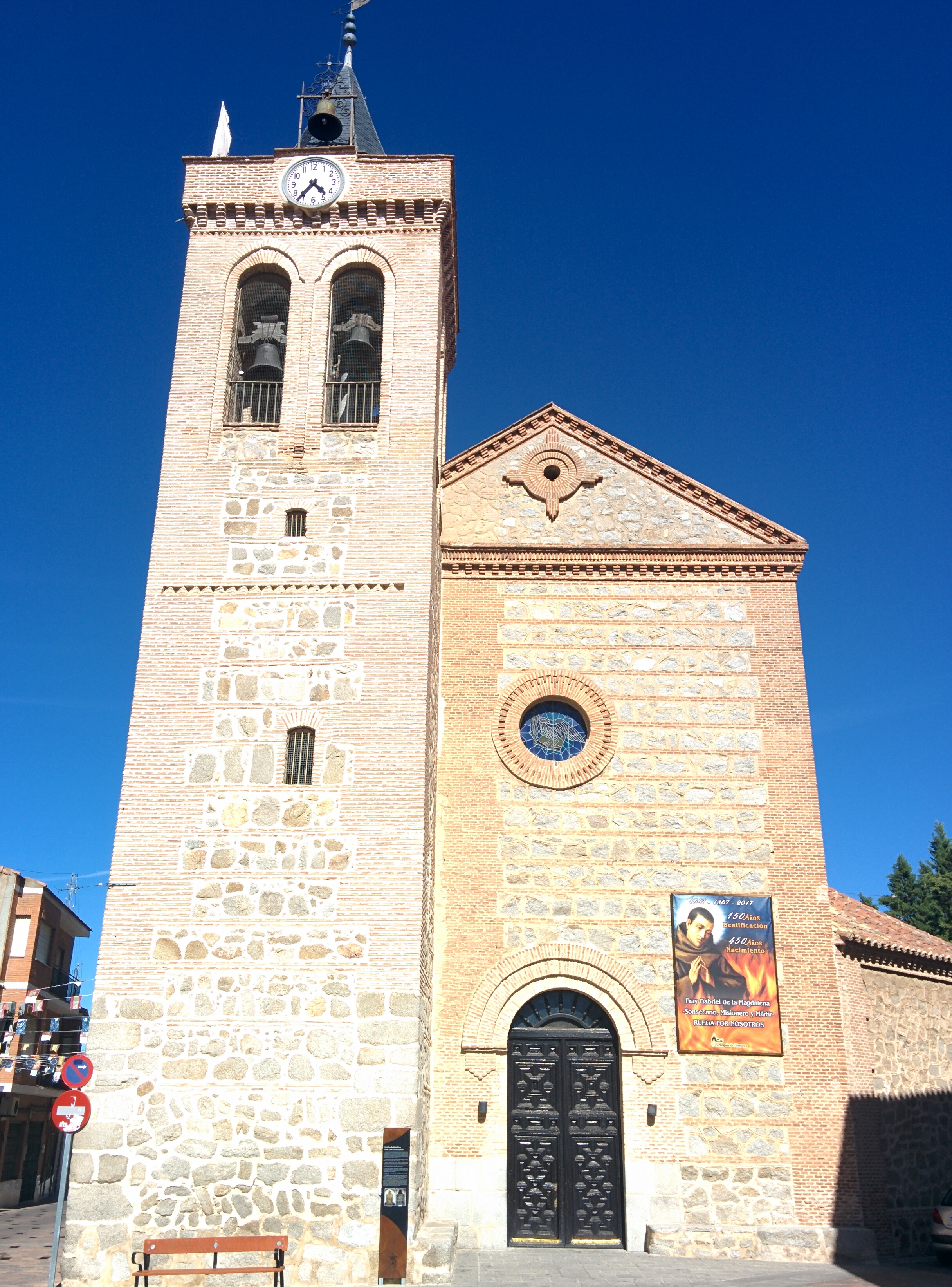 Iglesia de San Juan Evangelista, en Sonseca (Toledo, España).